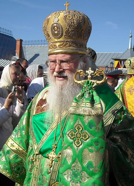 Архиепископ Евлогий (Смирнов)